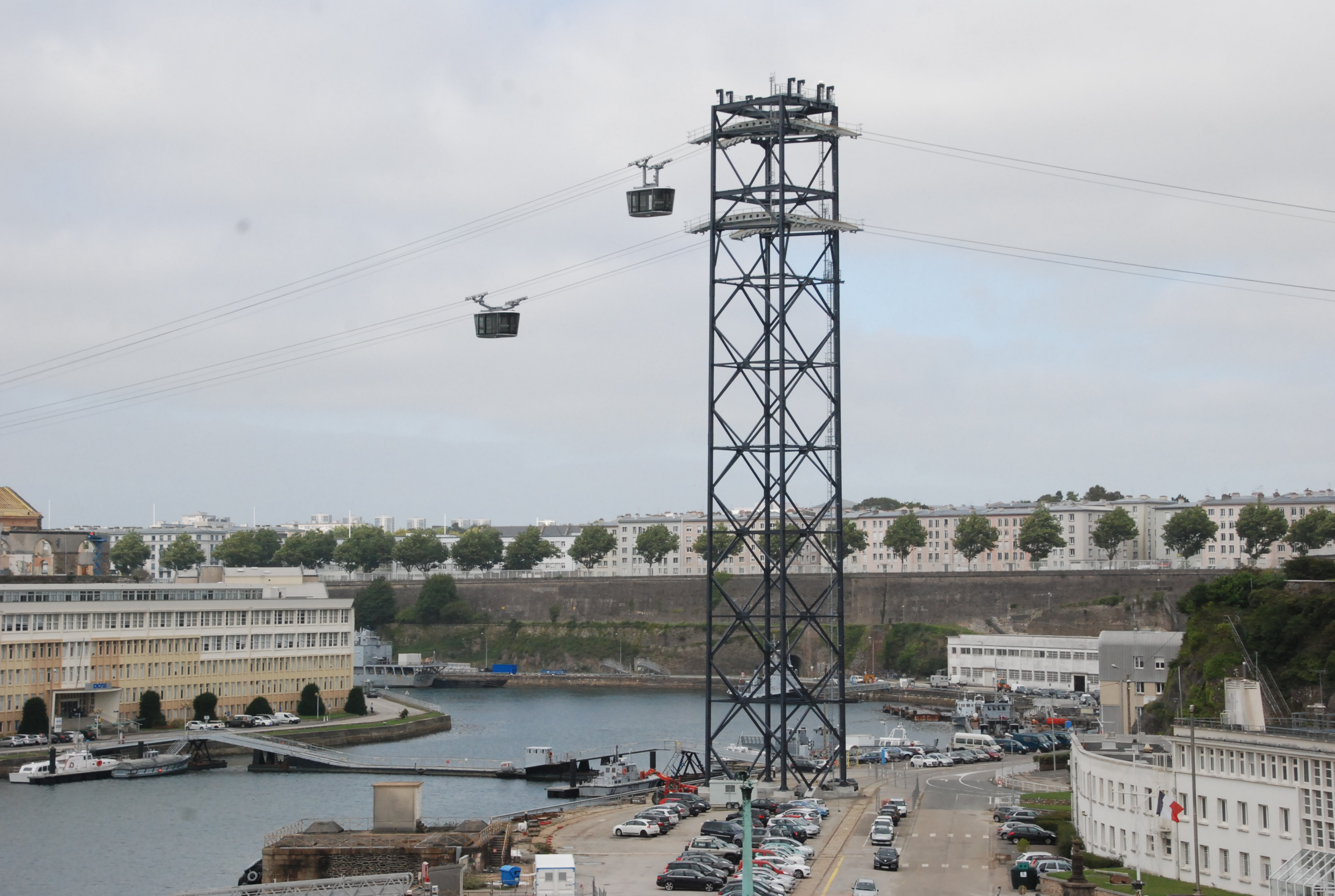 Test du téléphérique de Brest - Fin septembre 2016